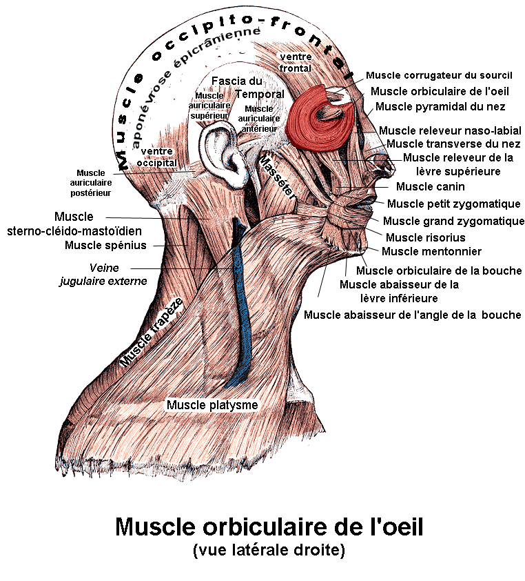 Muscle orbiculaire de l'oeil. Anatomie humaine